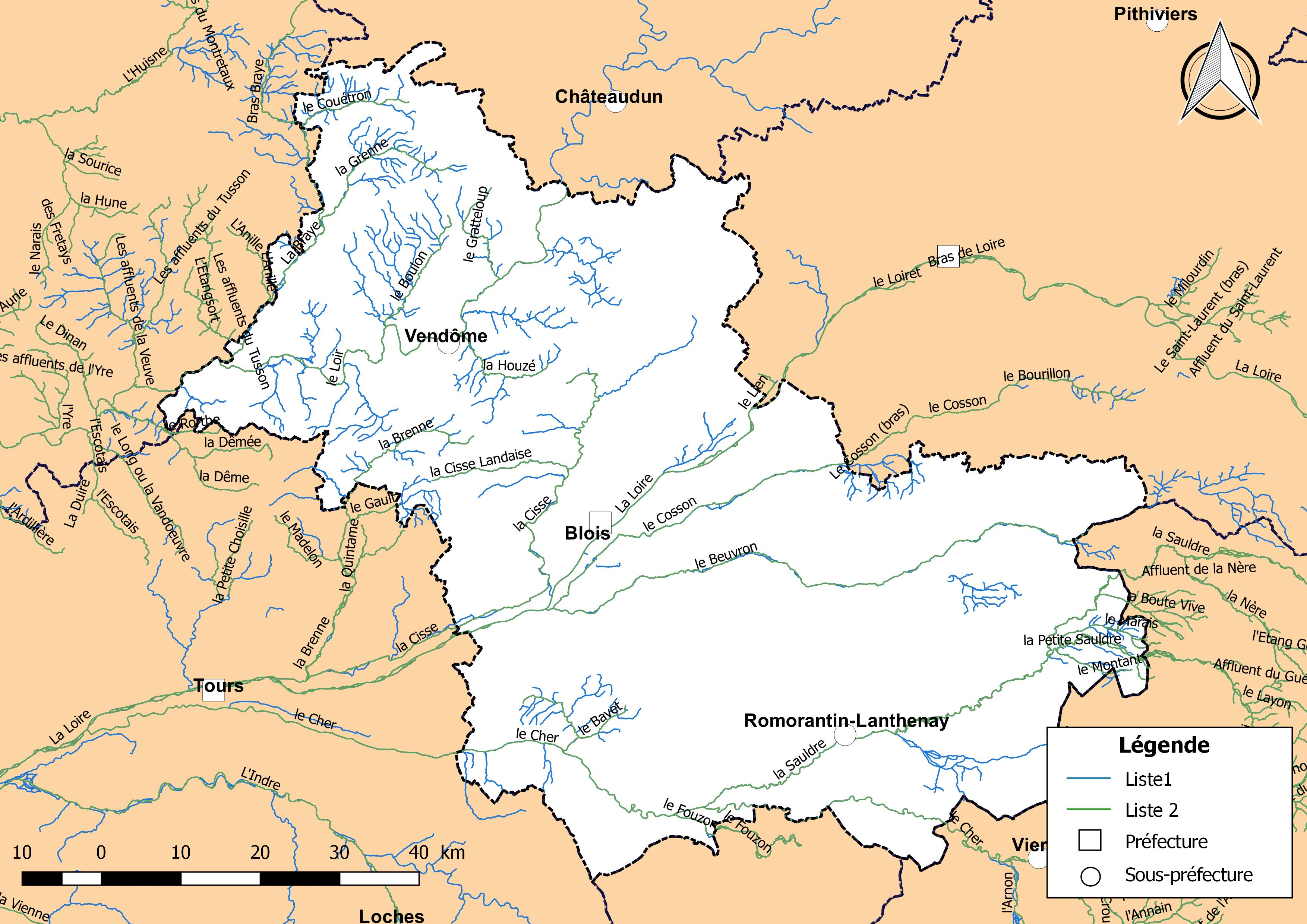 Classement des cours d'eau du département de Loir-et-Cher (France) au titre de la continuité écologique (article L214.17 I du Code de l'environnement).